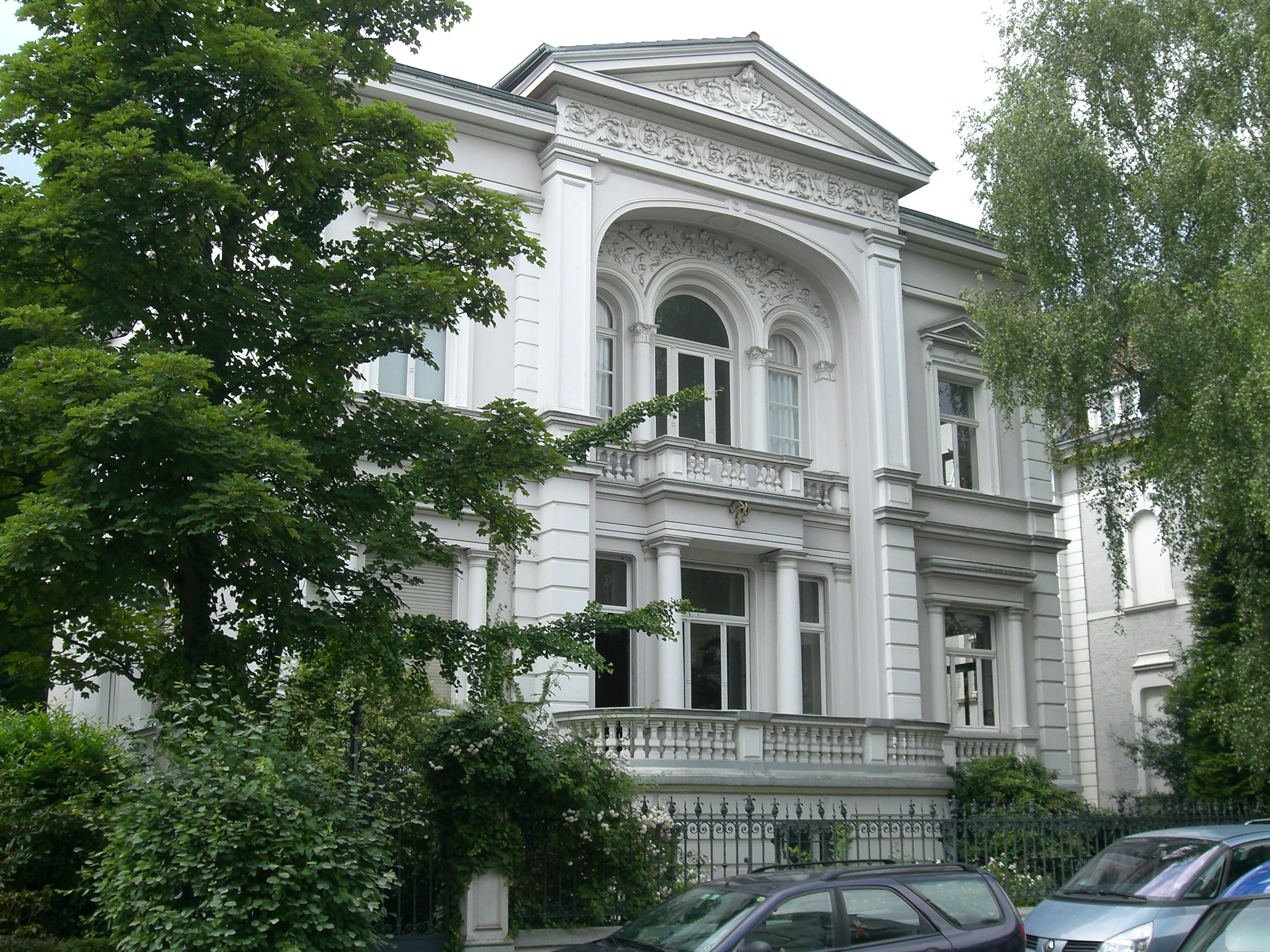 Villa Hanau FStr54